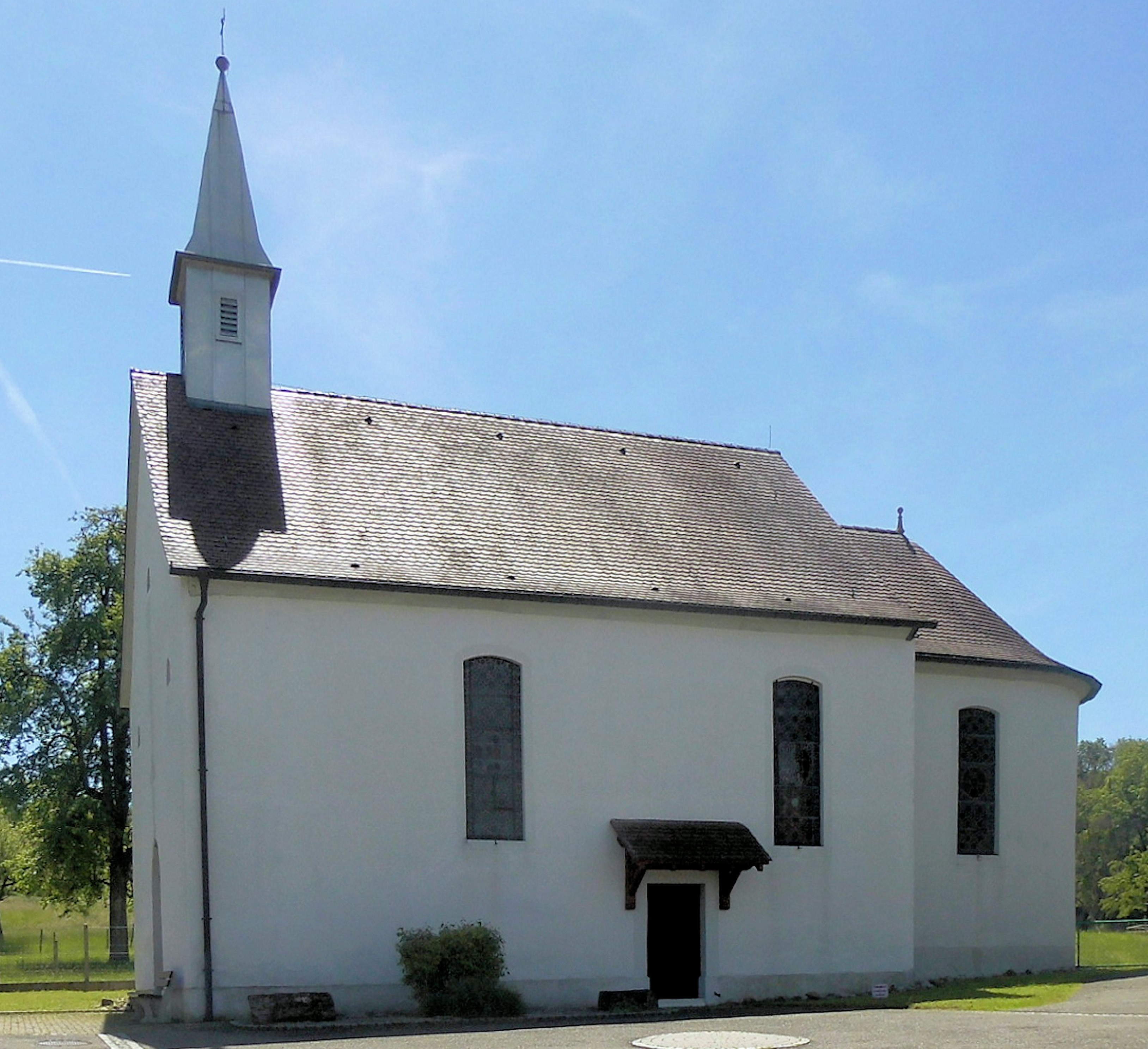 La chapelle de l'Exaltation-de-la-Sainte-Croix de Hagenthal-le-Bas